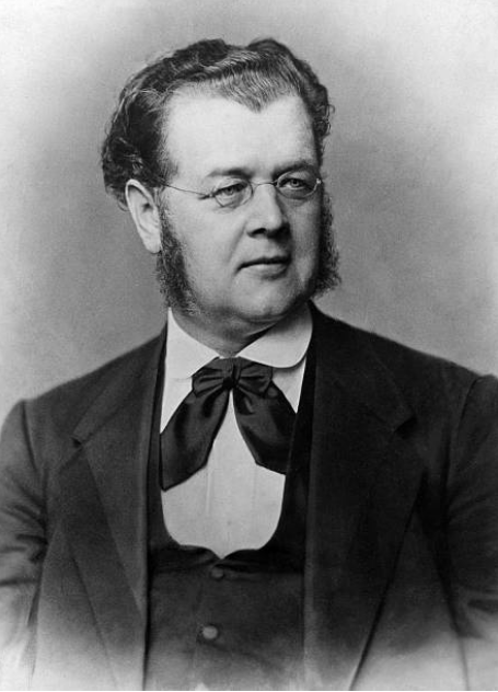 Albert Hofmann (1818-1880), Verleger, Theaterleiter, Begründer des Kladderadatsch